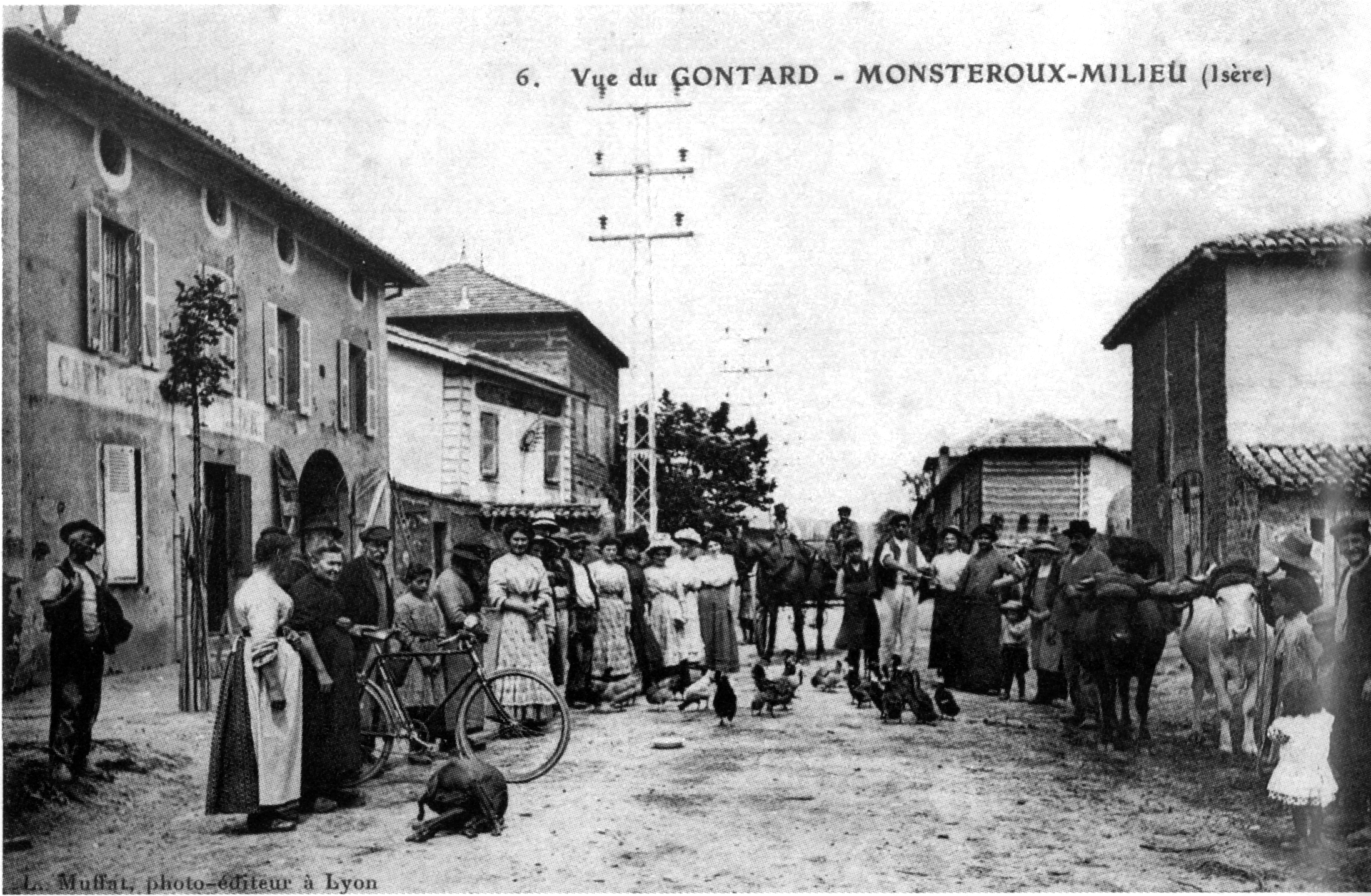 Monsteroux-Milieu, vue de Gontard en 1910